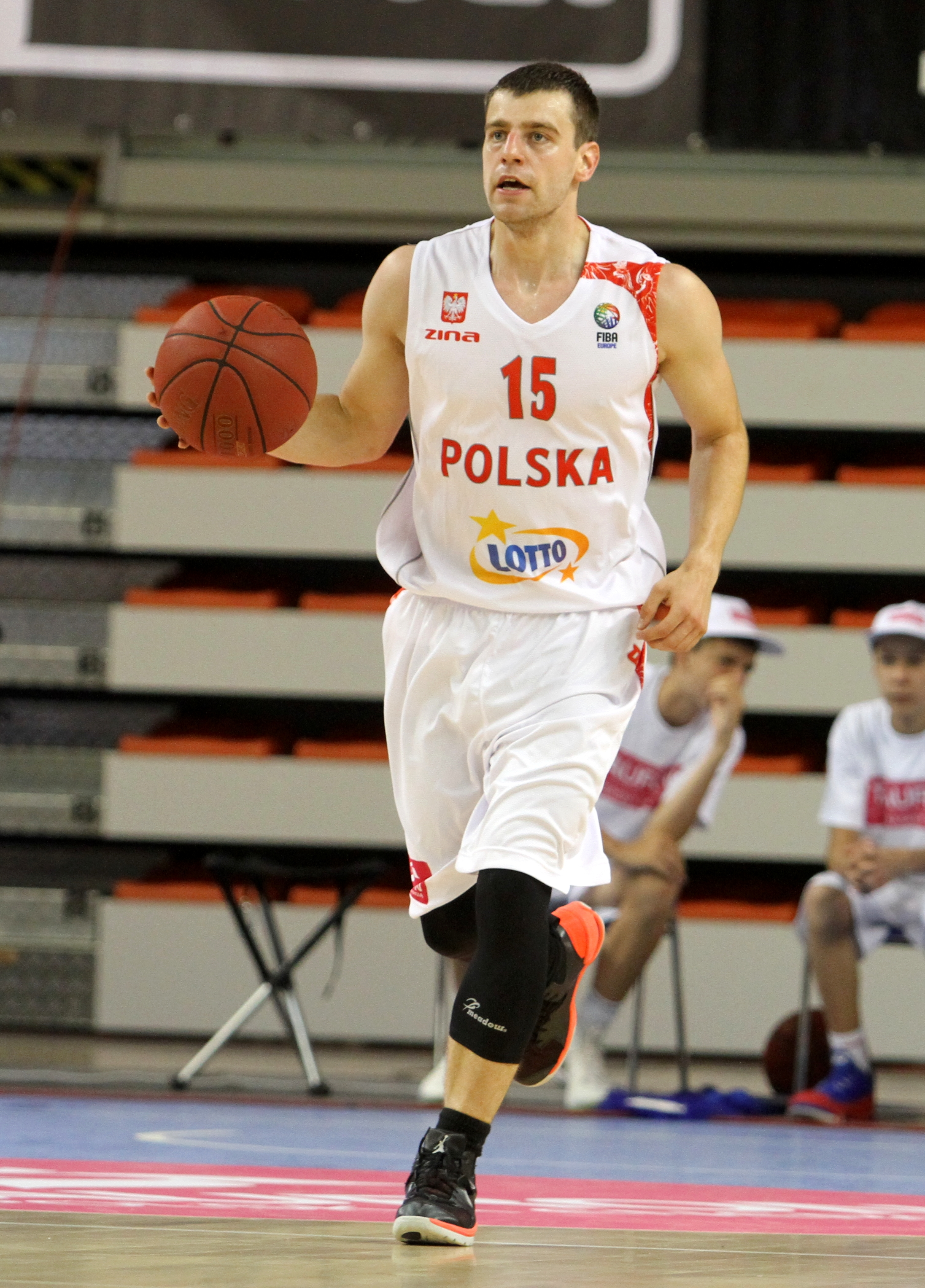 Mecz sparingowy reprezentacji Polski i Czech w koszykówce, Wałbrzych 18 lipca 2014